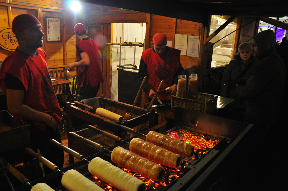 Am budapester Christkindlmarkt wird traditionell der ungarische Baumkuchen "Kürtőskalács" auf offenem Feuer hergestellt. Im Nachhinein streut man noch Zimt, Nüsse oder Zucker darüber